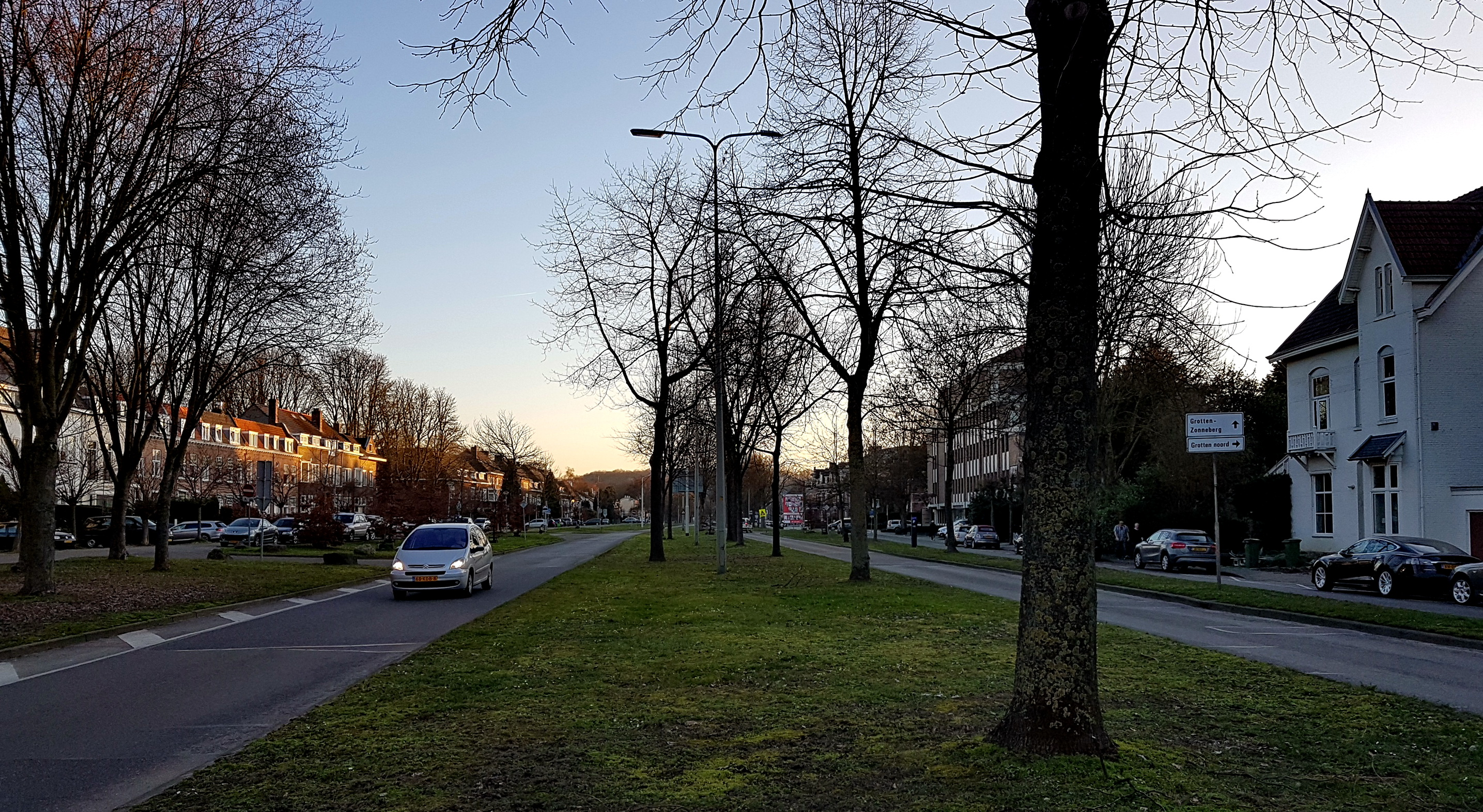 Zicht naar het zuiden op de Maasboulevard en de Sint Pieterskade (rechts) in Maastricht-Villapark.